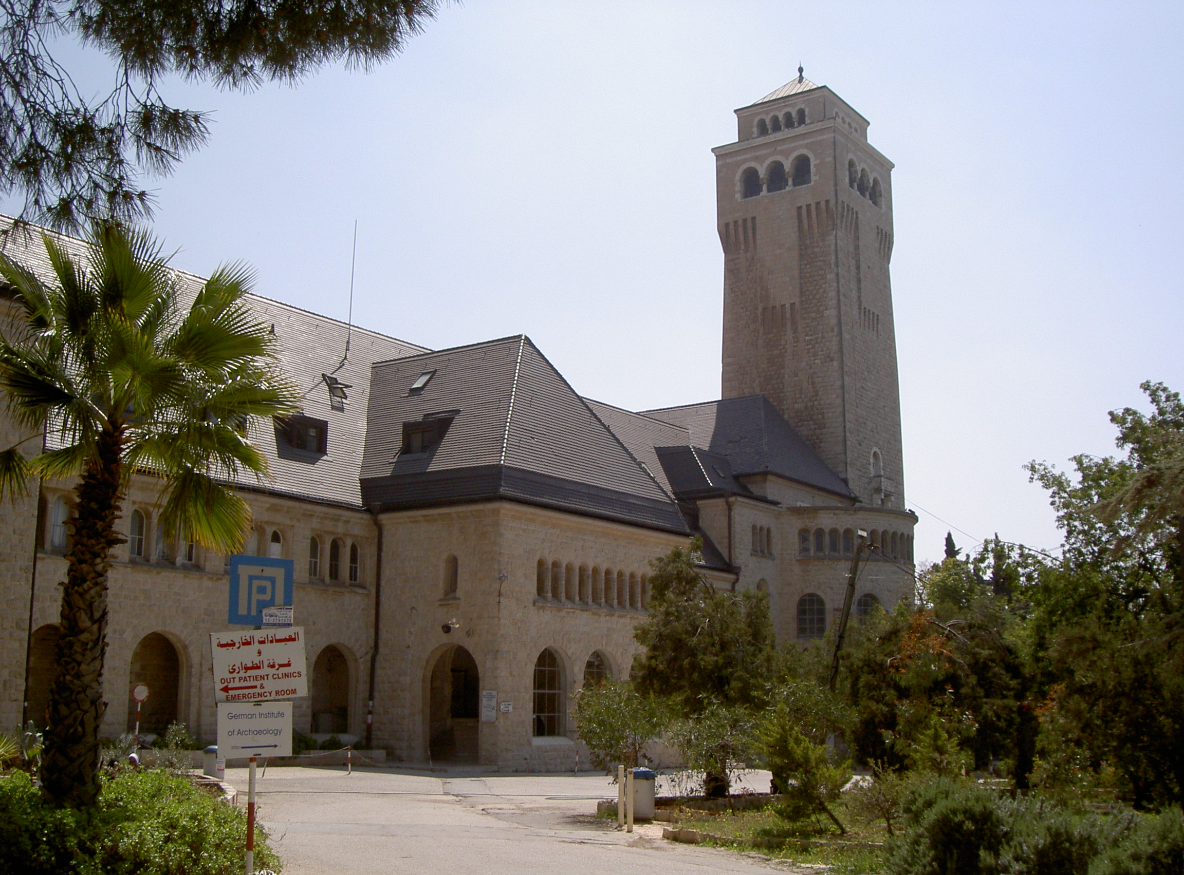 מתחם אַוּגוּסְטֶה ויקטוֹריה משתרע על שטח של כ-80 דונם בפסגת הר הזיתים בירושלים. נקרא על שם אוגוסטה ויקטוריה משלזוויג הולשטיין, אשתו של מקים המתחם, וילהלם השני, קיסר גרמניה. במתחם כנסייה עם מגדל פעמונים, וכן אכסניית צליינים. כיום משמש כבית חולים, ובמזרחו ממוקם "המכון הגרמני הפרוטסטנטי לארכאולוגיה בארץ הקודש".